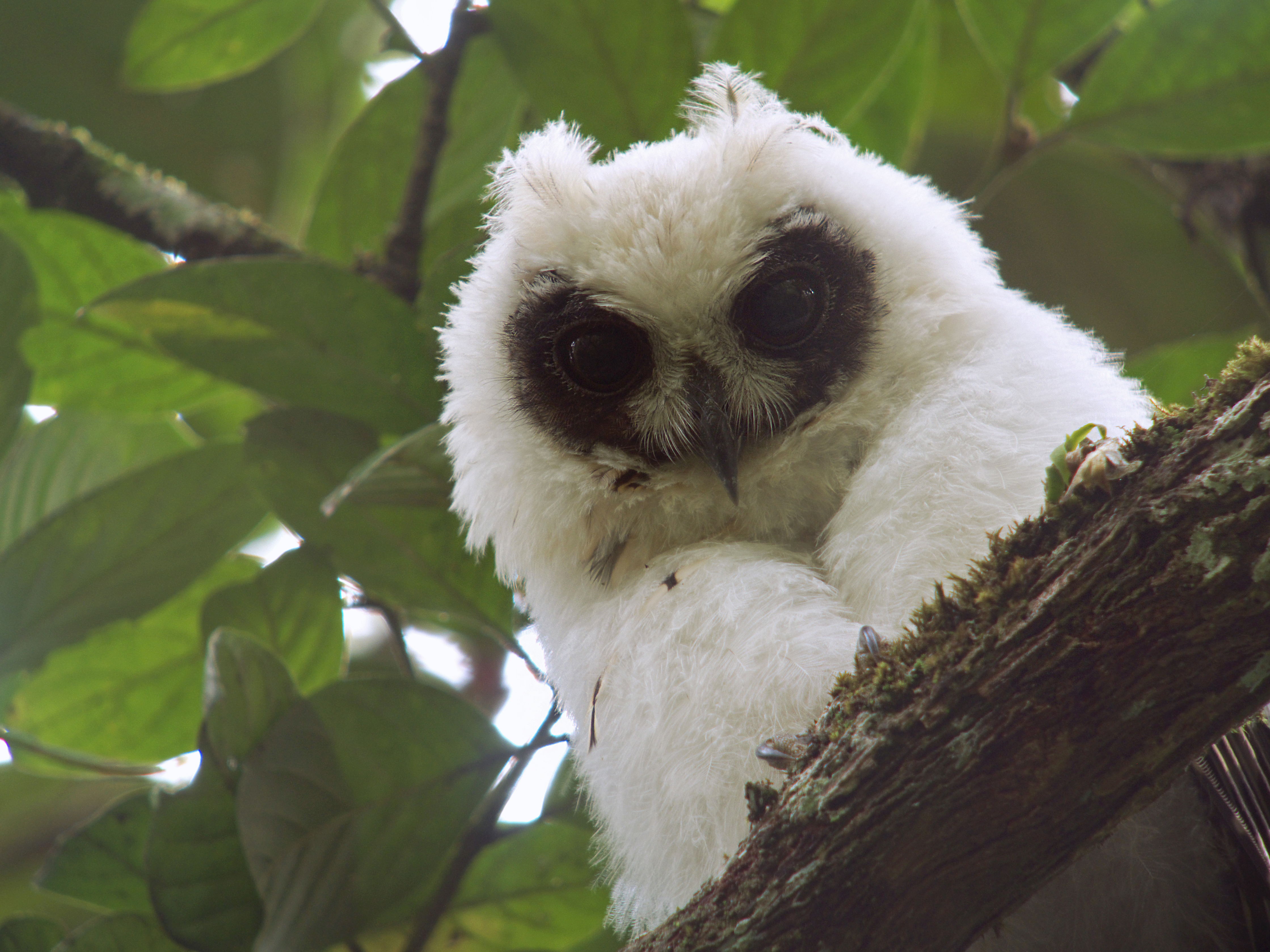 Juvenile Madagascar Long-eared Owl (Asio madagascariensis), Andasibe, Madagascar